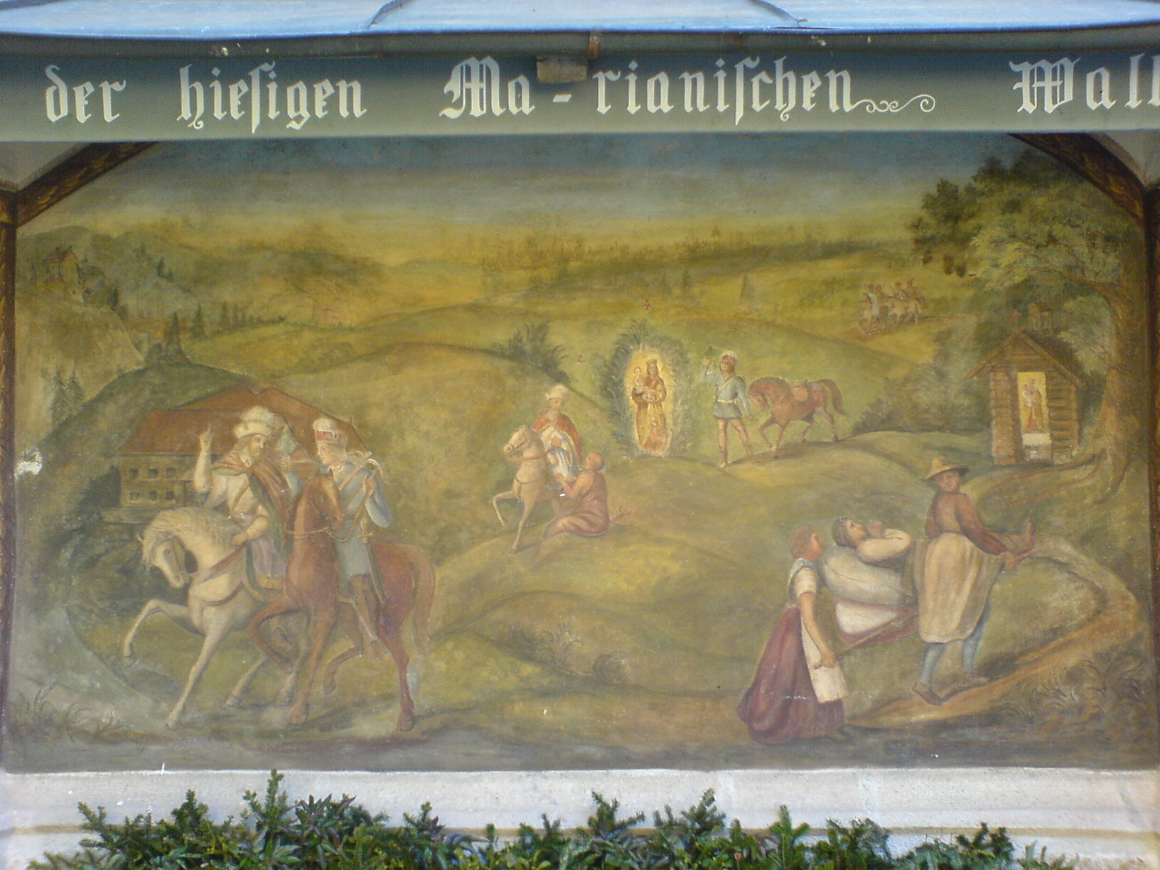 Wandmalerei an der Mauer der Pfarr- und Wallfahrtskirche Kößlarn